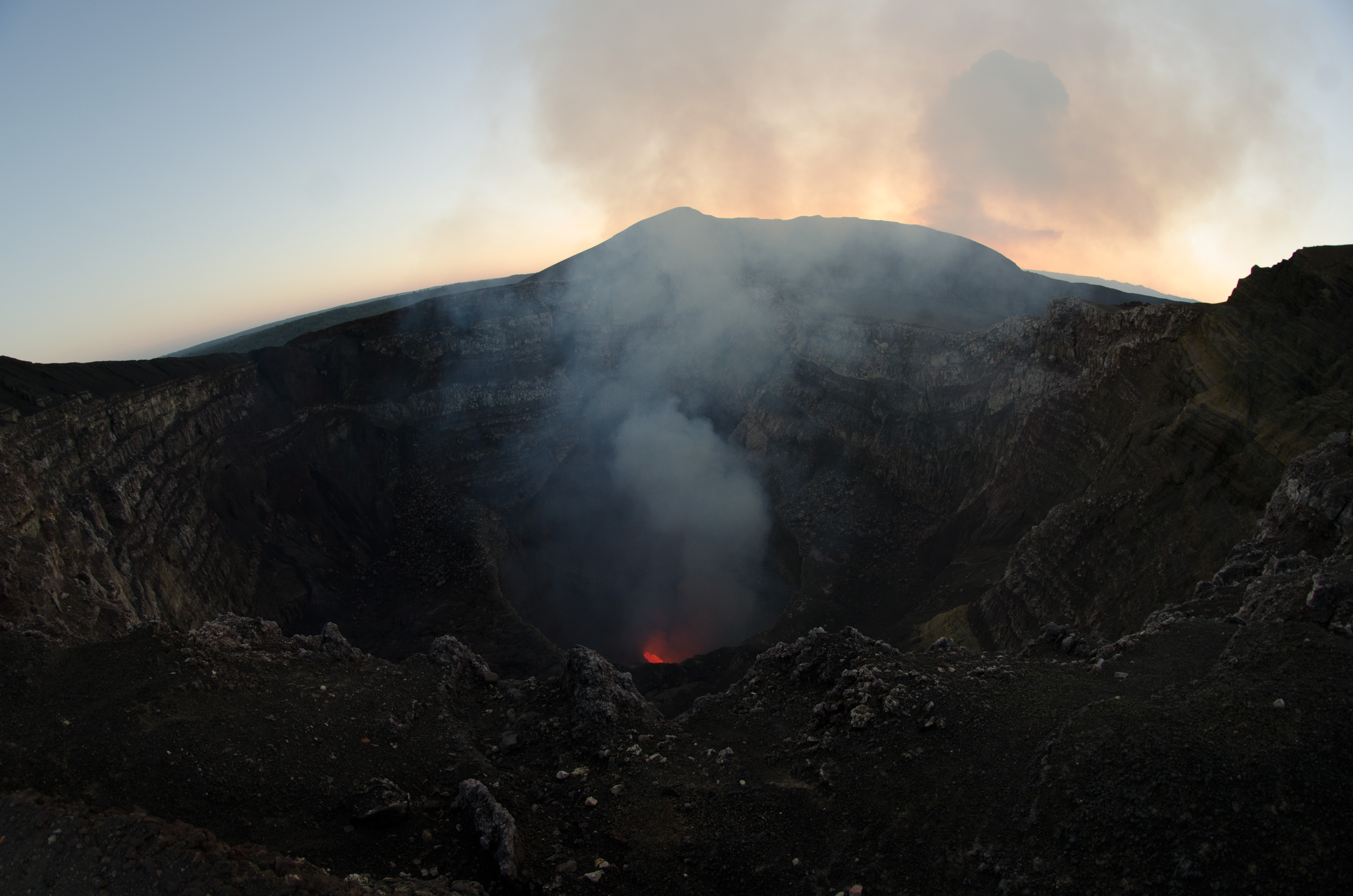 Vista del crater del volcan masaya